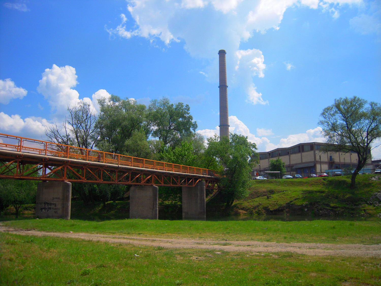 Incelov_dimnjak_i_most